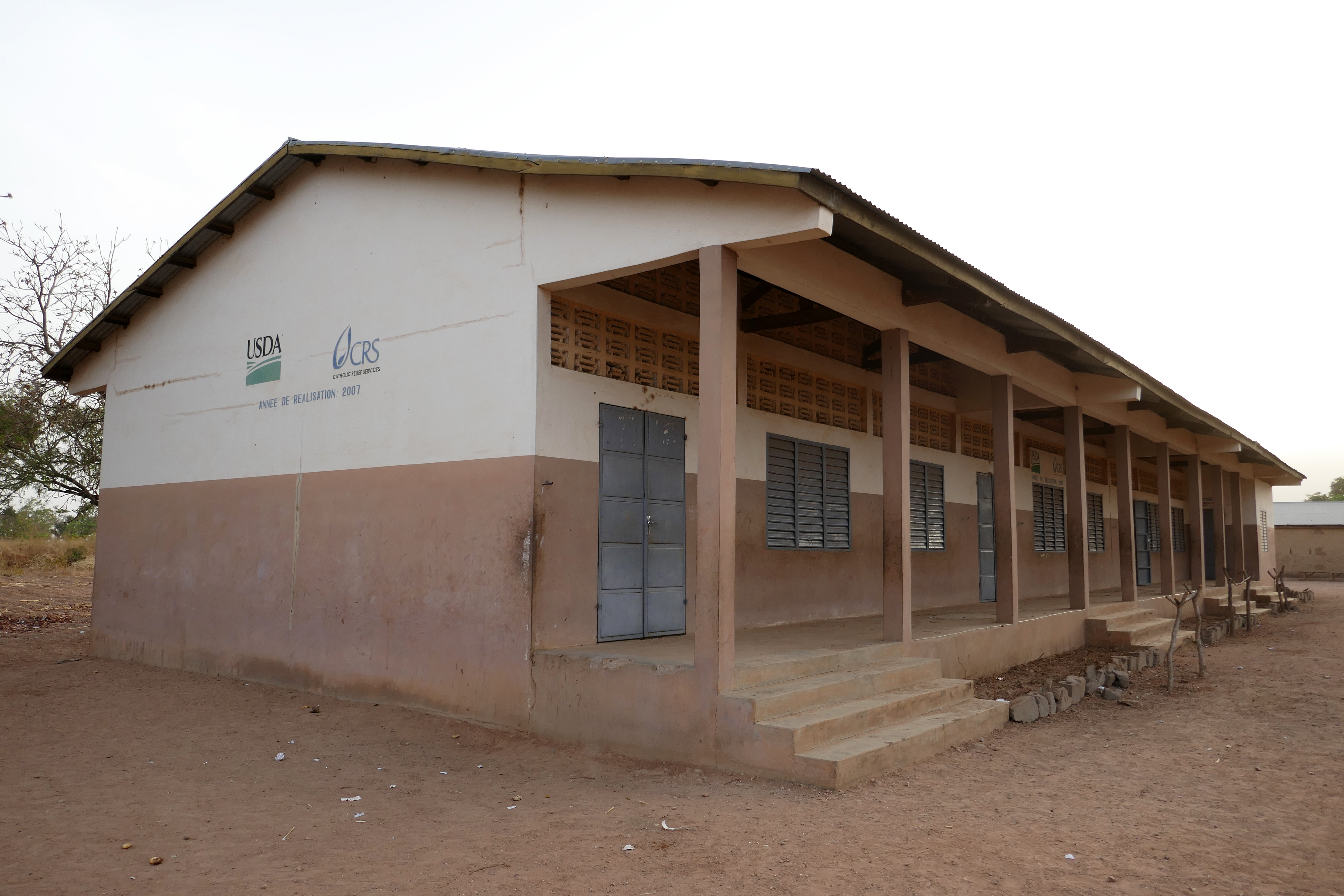 Ecole primaire publique de Dimatadoni (arrondissement de Manta, commune de Boukombé, Atakora, Bénin).